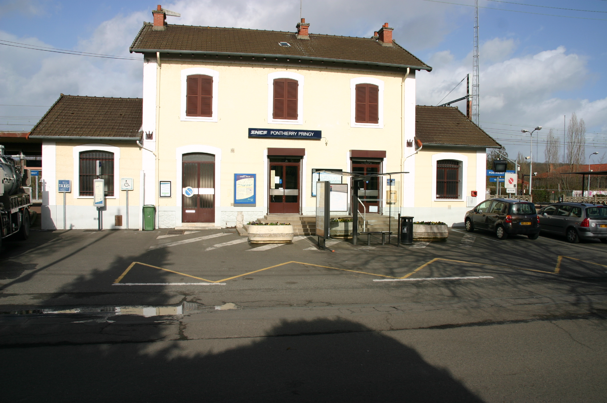 La gare de Ponthierry - Pringy, Saint-Fargeau-Ponthierry, département de la Seine-et-Marne (France)